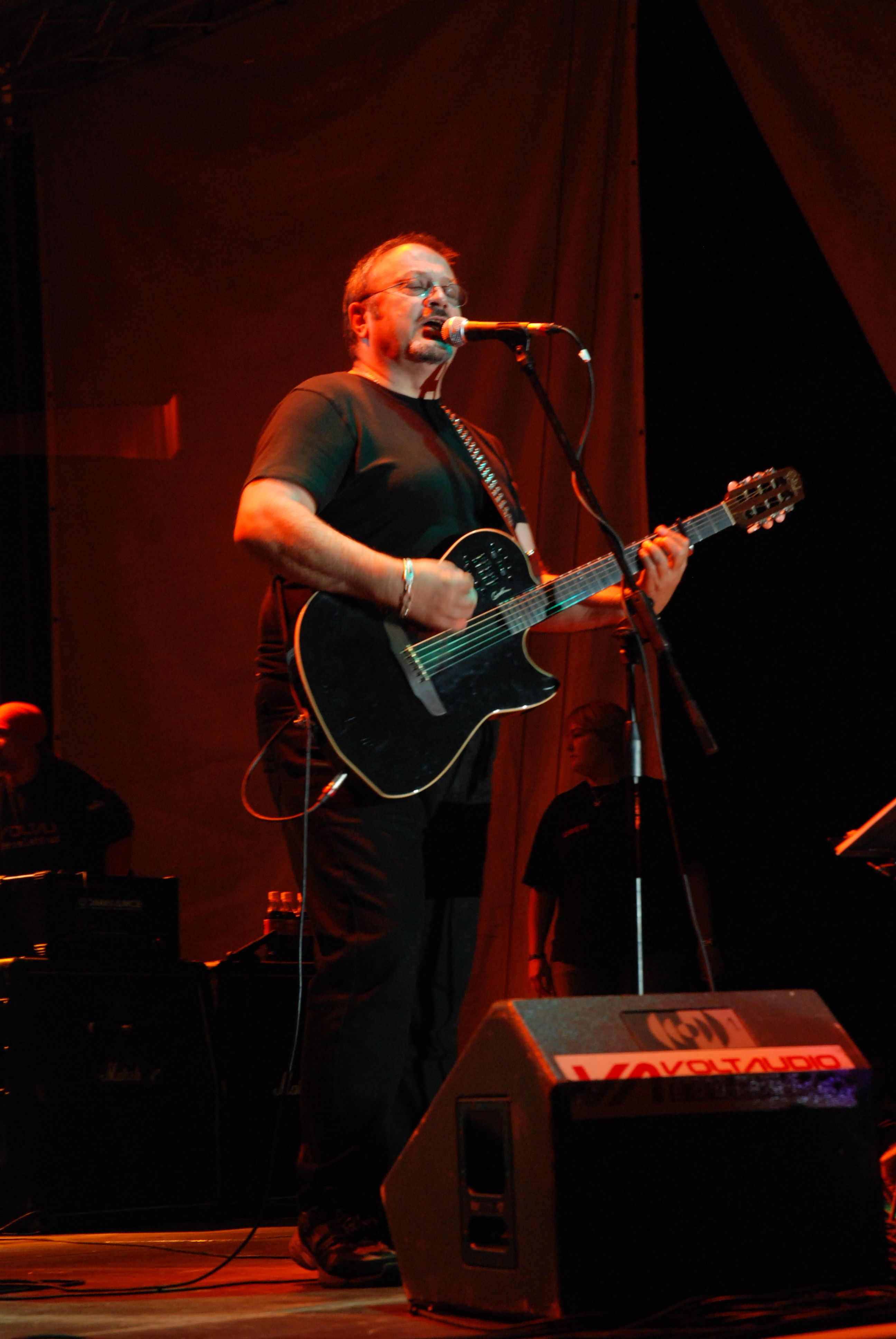 Mircea Baniciu, concert al formației Phoenix, Șimleu Silvaniei, 14 iulie 2007.